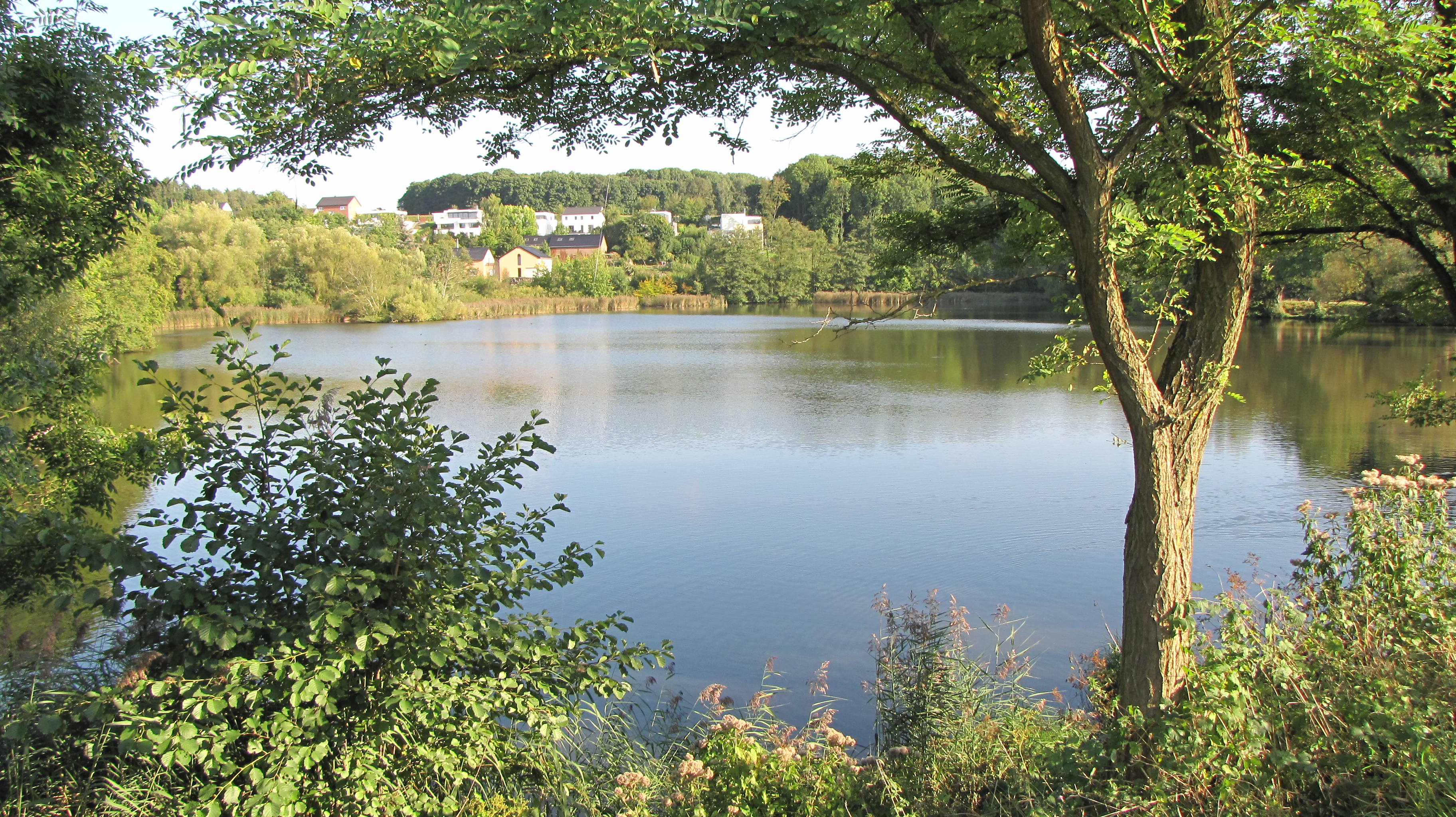 Cet étang subsiste du casino de La Calamine aujourd'hui disparu. Il fait partie d'une zone naturelle protégée.